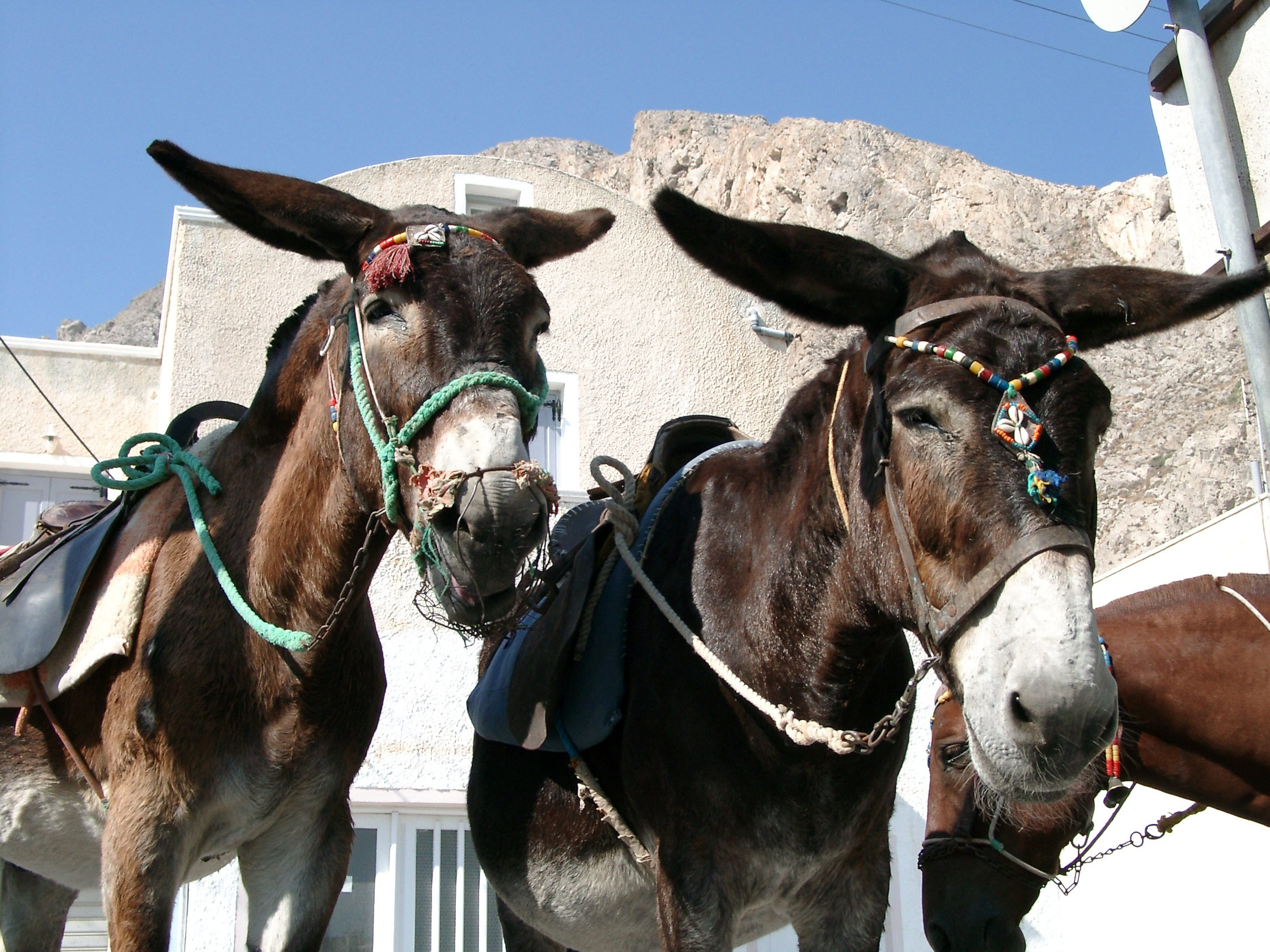 Esel auf Santorin